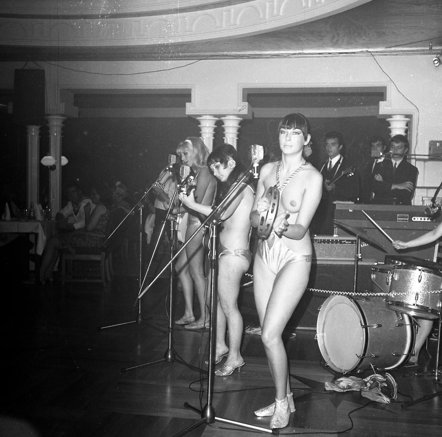 Jentenes navn: Nichole(?), Sussi, Jeanette, Bonni. I September opptrådte jentebandet sammen med The New Yardbirds ved Fjordvilla Rock Paramount i Roskilde. The New Yardbirds skiftet senere samme år navn til Led Zeppelin. Kilde: Led Zeppelin Database Foto: Eirik Sundvor (1902 - 1992). Format: Negativ. År: 1968, 30 Juli. Sted: Bergen.